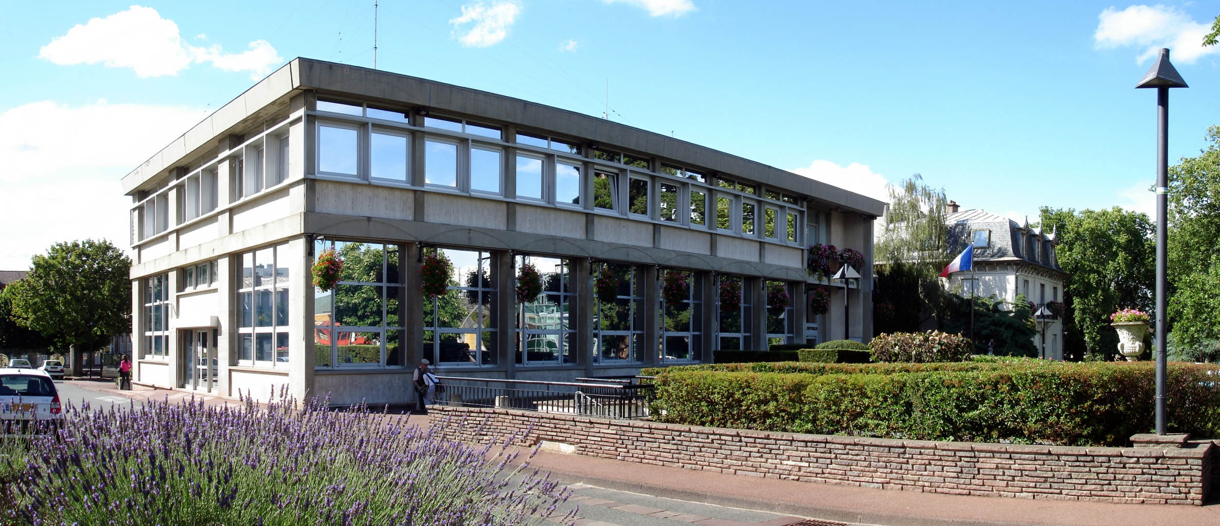 L'hôtel de ville de Franconville (Val-d'Oise), France